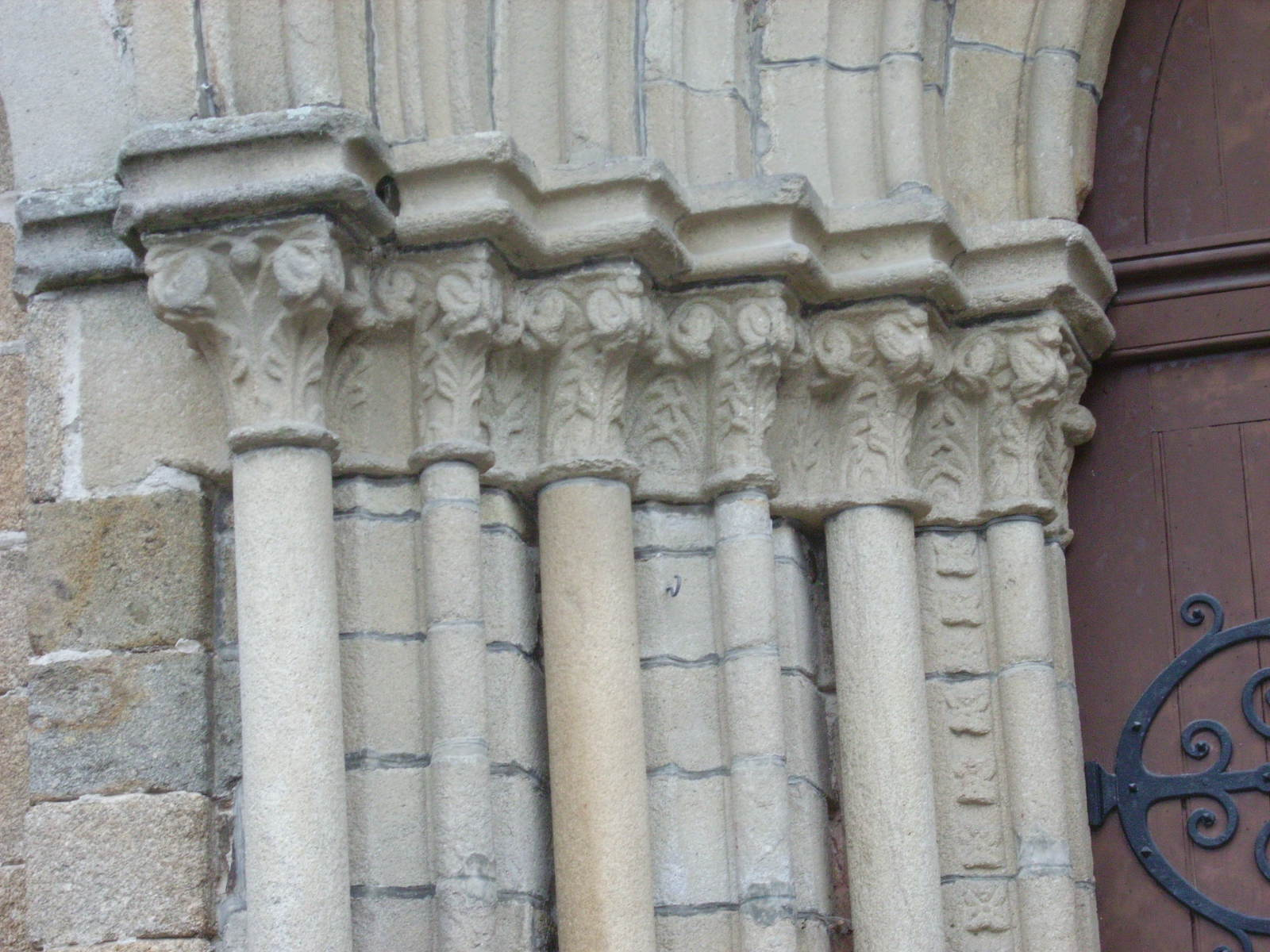 Kolonetoj sur la fasado de la preĝejo de Léhon